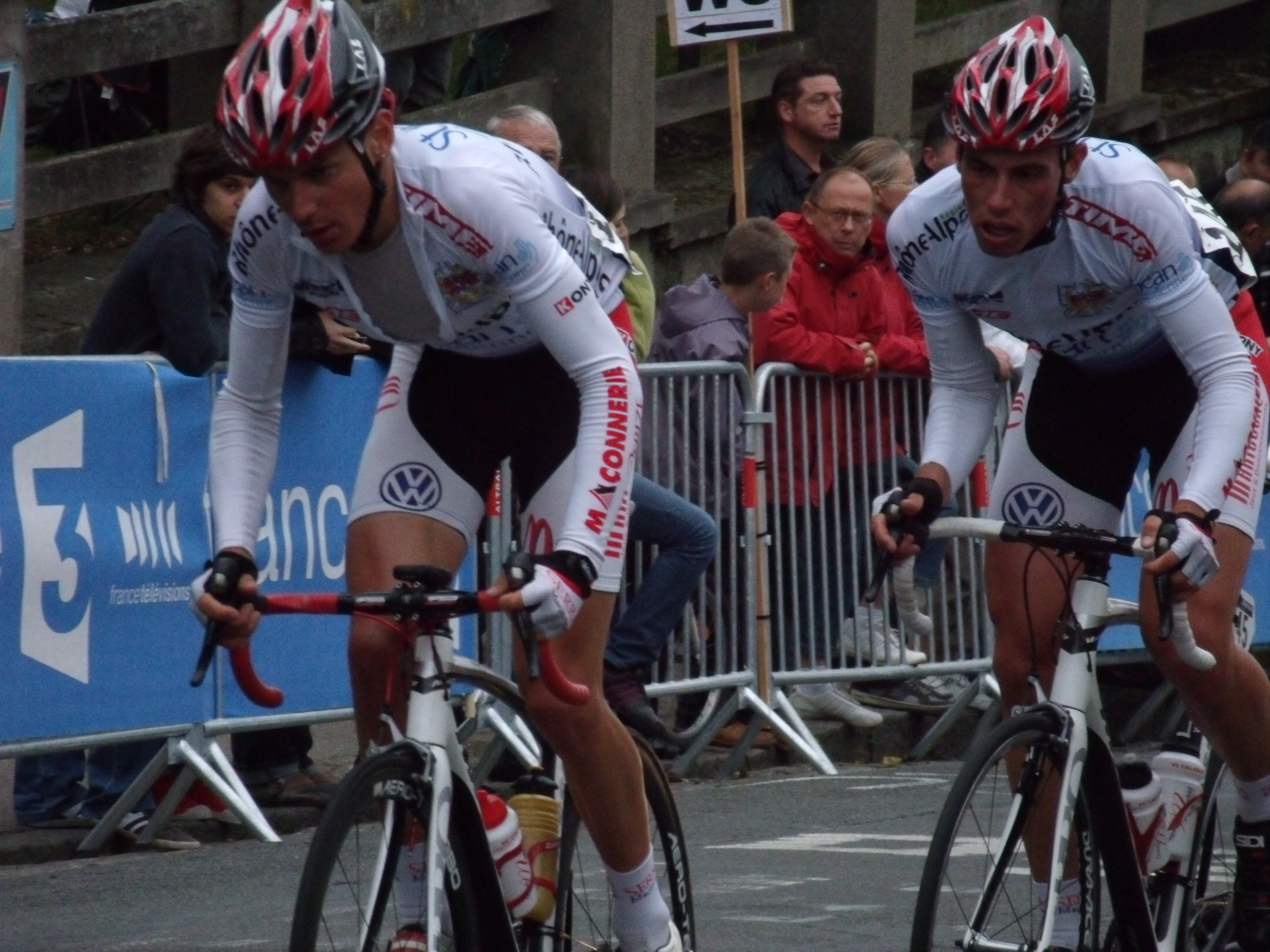 Blaise Sonnery et Vincent Canard pendant le championnat de France sur route amateur 2011